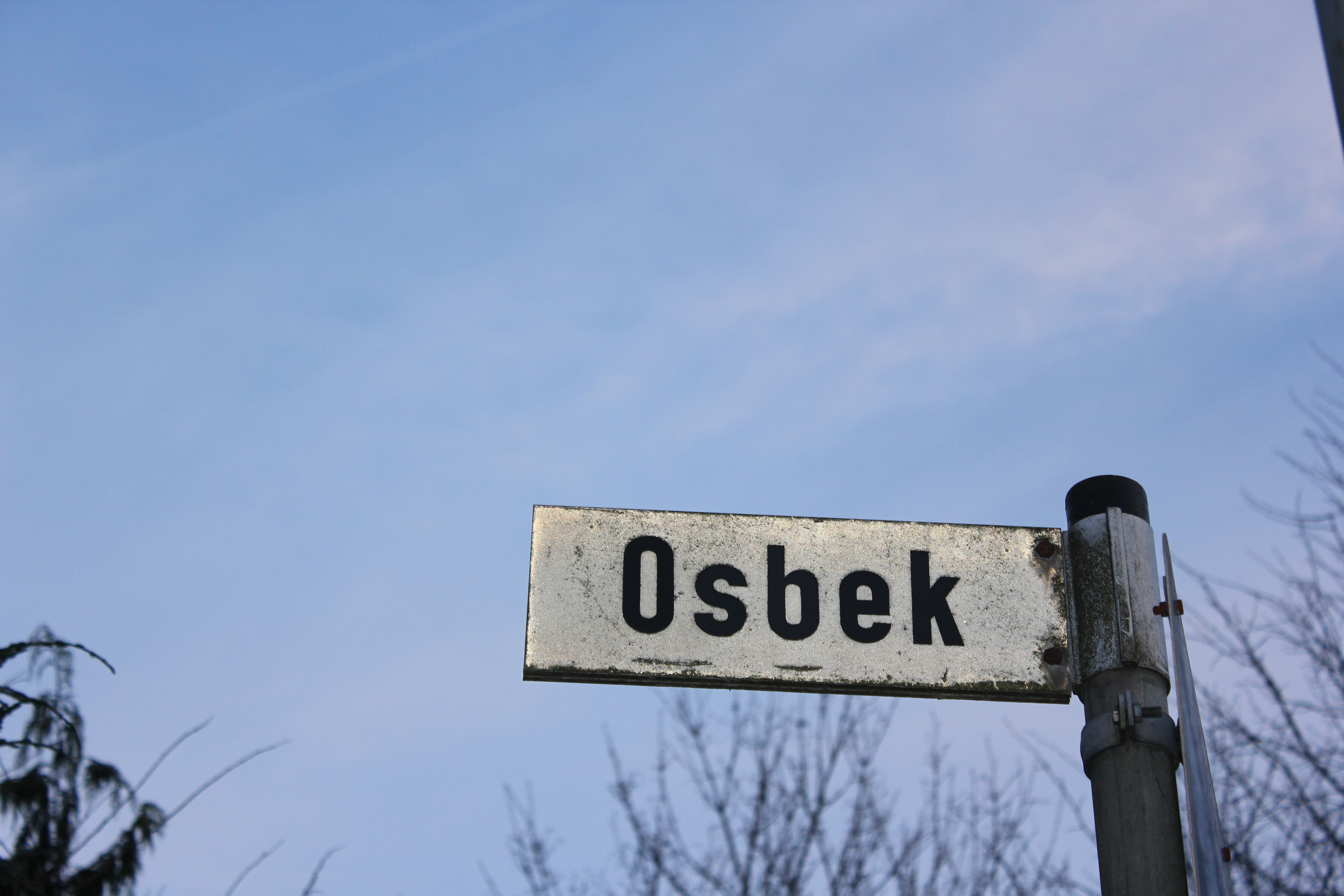 Straßenschild Osbek (Flensburg 2013), Bild 02